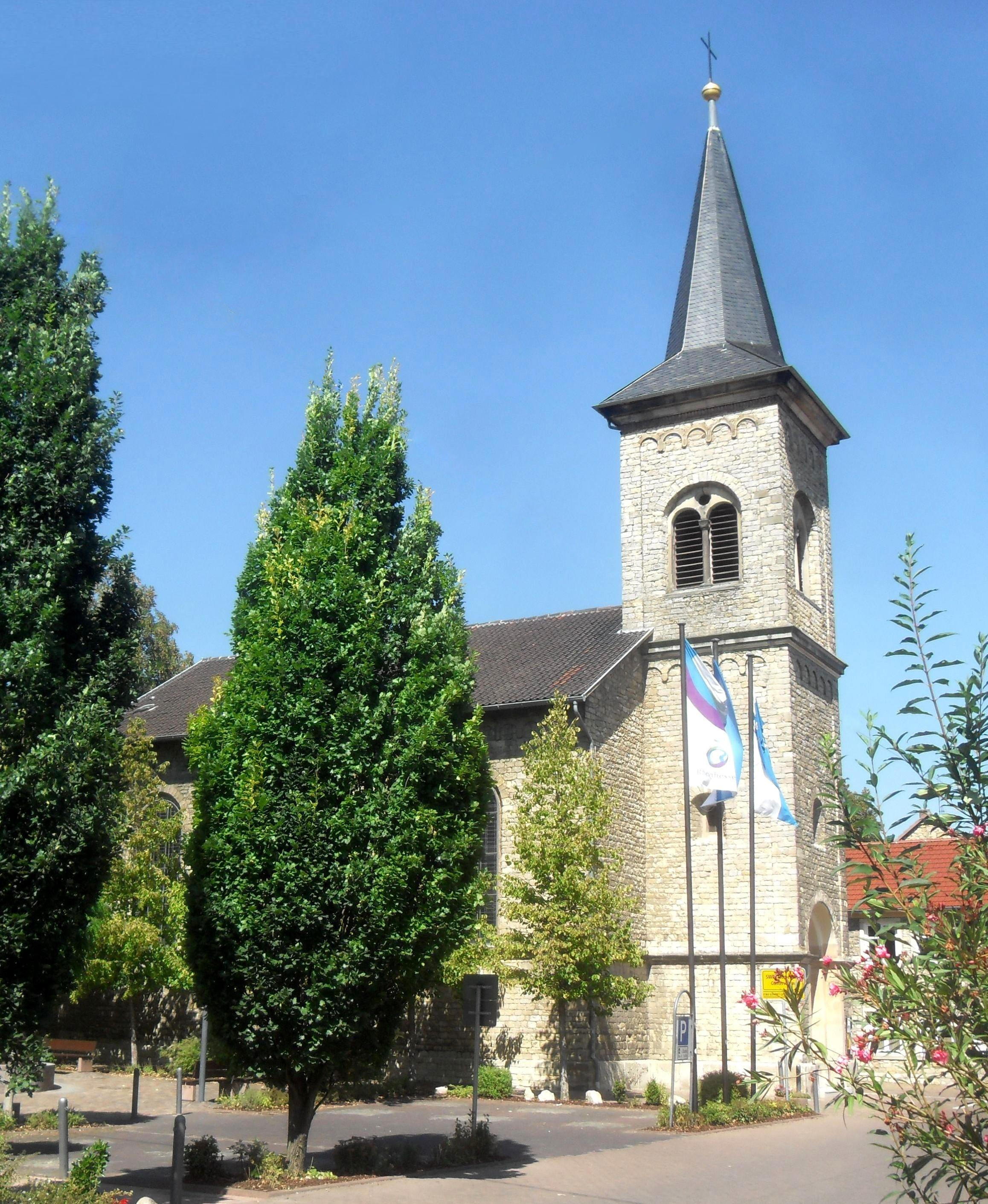 Die Guntersblumer katholische Kirche in Rheinhessen in Rheinland-Pfalz (Deutschland) von der Alsheimer Straße aus